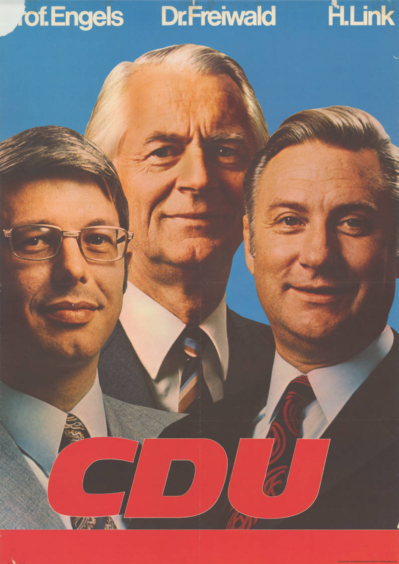 Prof. Engels Dr. Freiwald H. Link CDU Abbildung: Porträtfotos Plakatart: Kandidaten-/Personenplakat mit Porträt Auftraggeber: CDU Stadtkreisverband Frankfurt am Main Objekt-Signatur: 10-031 : 807 Bestand: CDU-Plakate (10-031) GliederungBestand10-18: Personenplakate Lizenz: KAS/ACDP 10-031 : 807 CC-BY-SA 3.0 DE